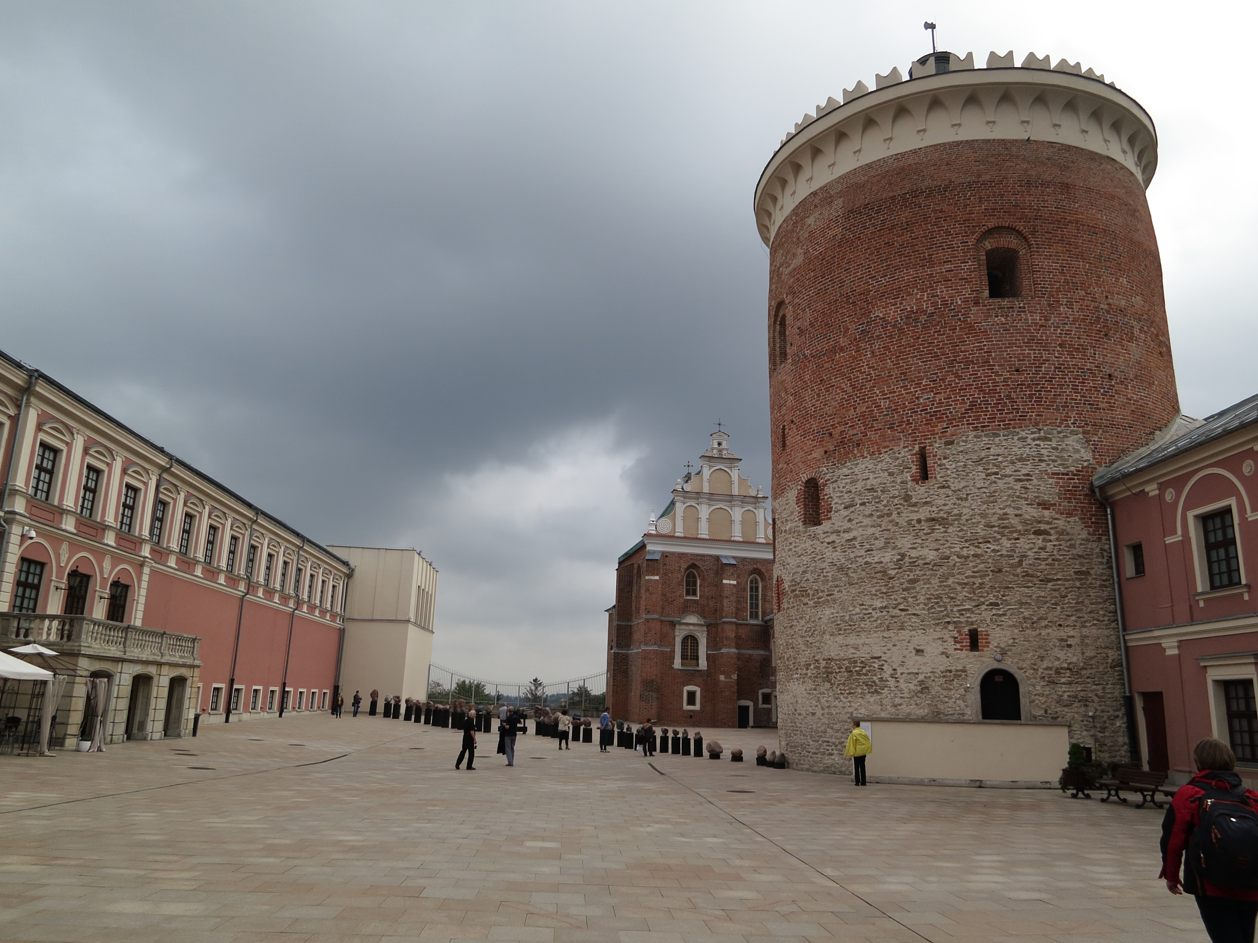 Lublin, zamek